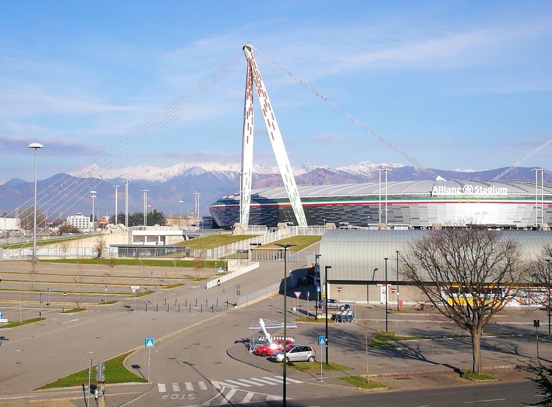 JUVENTUS ALLIANZ STADIUM TORINO EXTERIEUR PARKING SUD ET LES ALPES EN ARRIERE PLAN